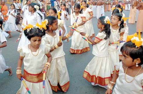 Vaikunda Avathara Orvalam kids